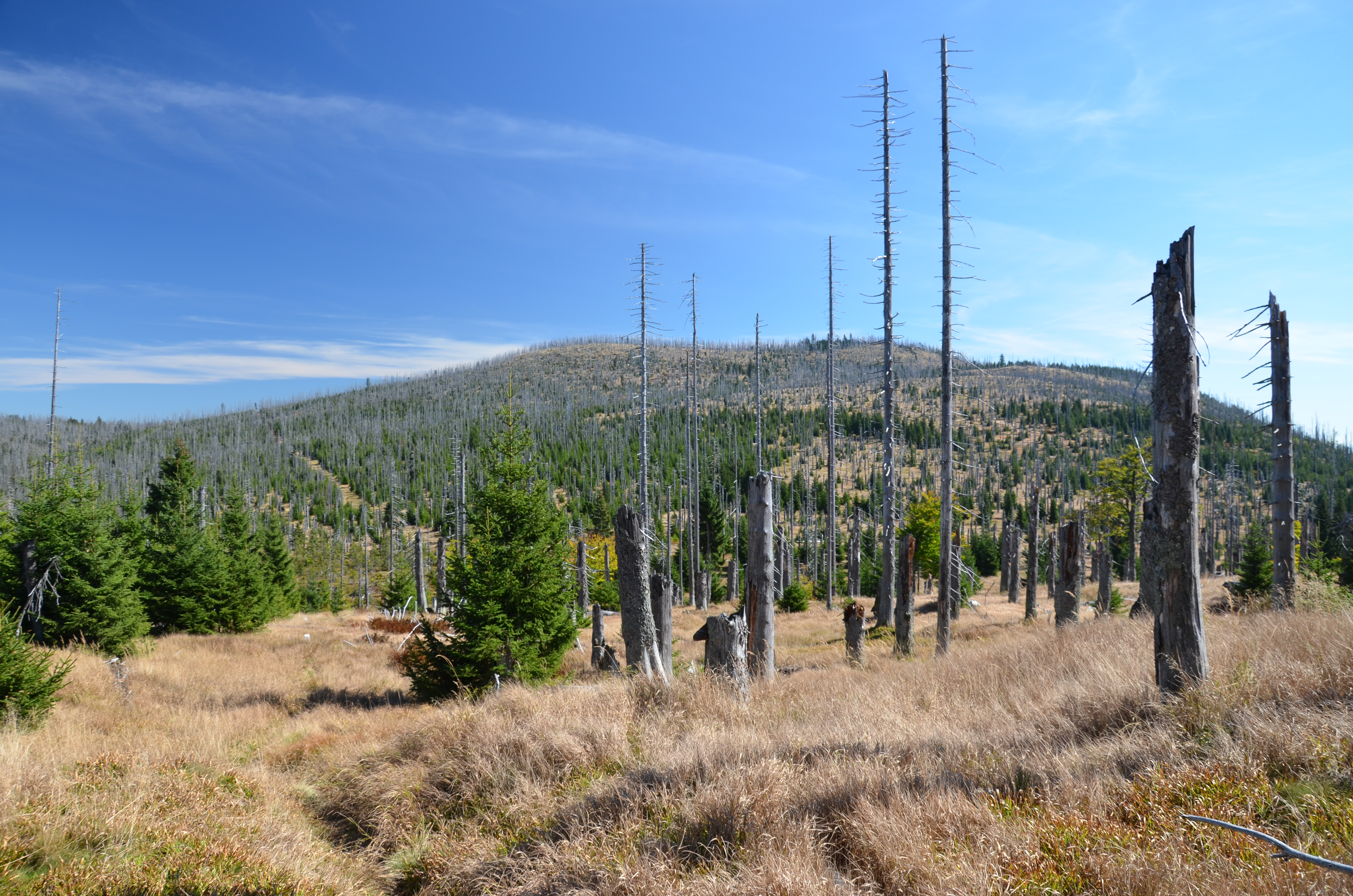 Blatný vrch (něm. Plattenhausenriegel, 1376 m) na Šumavě/v Bavorském lese, pohled ze západu z hraničního chodníku